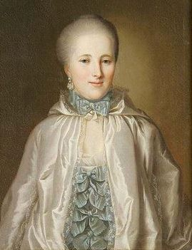 Ernestine Rosine Goll, geb. Flachsland (1742-1774), Mätrese von Ludwig IX. (Hessen-Darmstadt)